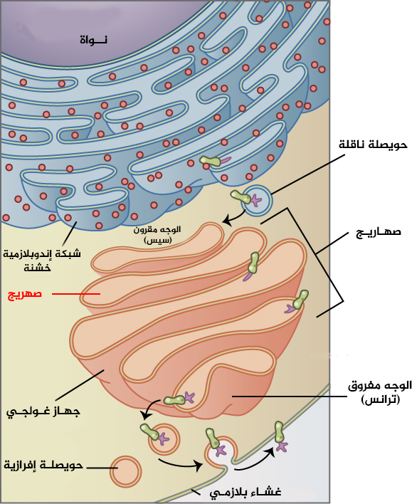 يعدل جهاز غولجي نواتج الشبكة الإندوبلازمية، وينتج أيضا عضيات جديدة تسمى يحلولات. تُرسل البروتينات ونواتج أخرى من الشبكة الإندوبلازمية إلى جهاز غولجي الذي ينظمها ويعدلها ويجمعها ويوسمها. تُنقل بعض هذه النواتج إلى مناطق أخرى من الخلية ويتم تصدير بعضها خارج الخلية بواسطة الإخراج الخلوي. يتم تجميع الإنزيمات البروتينية في يحلولات جديدة (أو تُجمع وتُرسل لتندمج مع يحلولات موجودة)